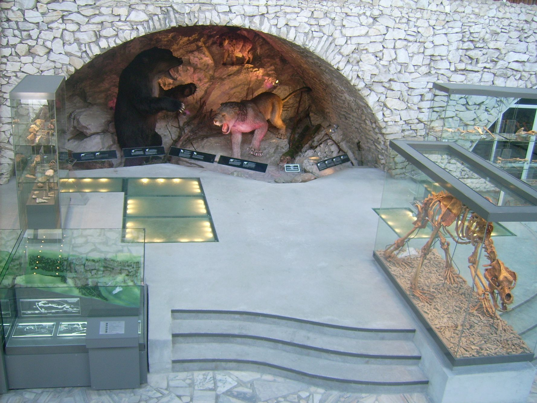 Fragment nowej ekspozycji w holu Jaskini Niedźwiedziej